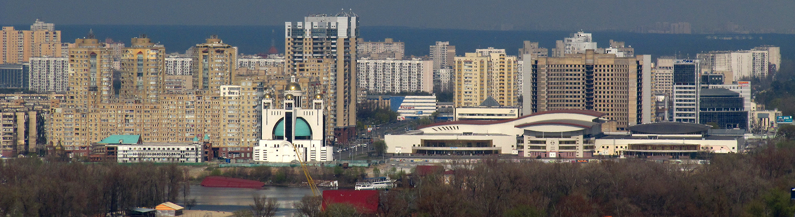 Вид від монументу у парку Слави на Лівий берег, та Долобецький та Венеціанський острови